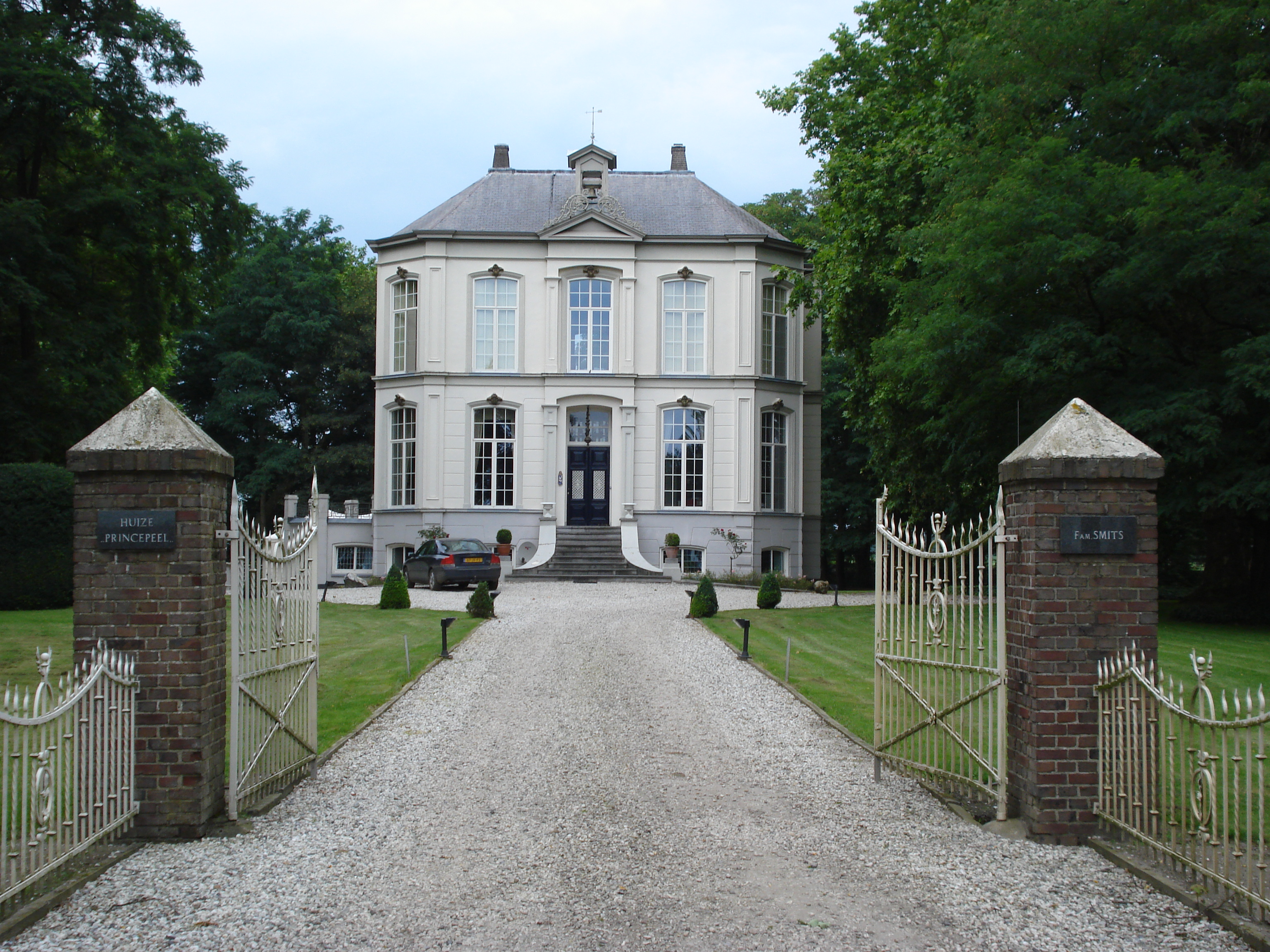 Wilbertoord, Huize Princepeel